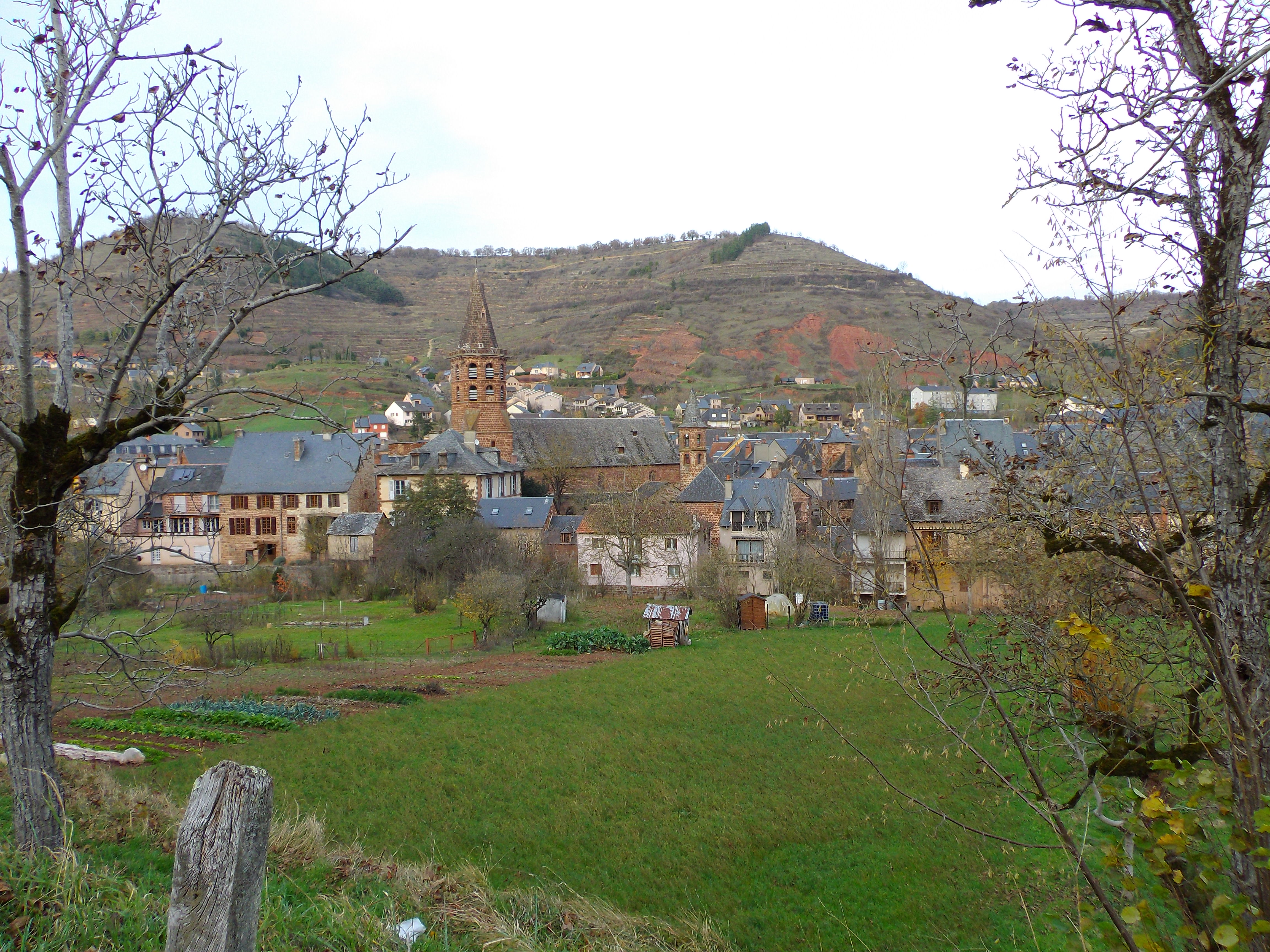 Vue de Marcillac (Aveyron, France) depuis la route départementale 204.